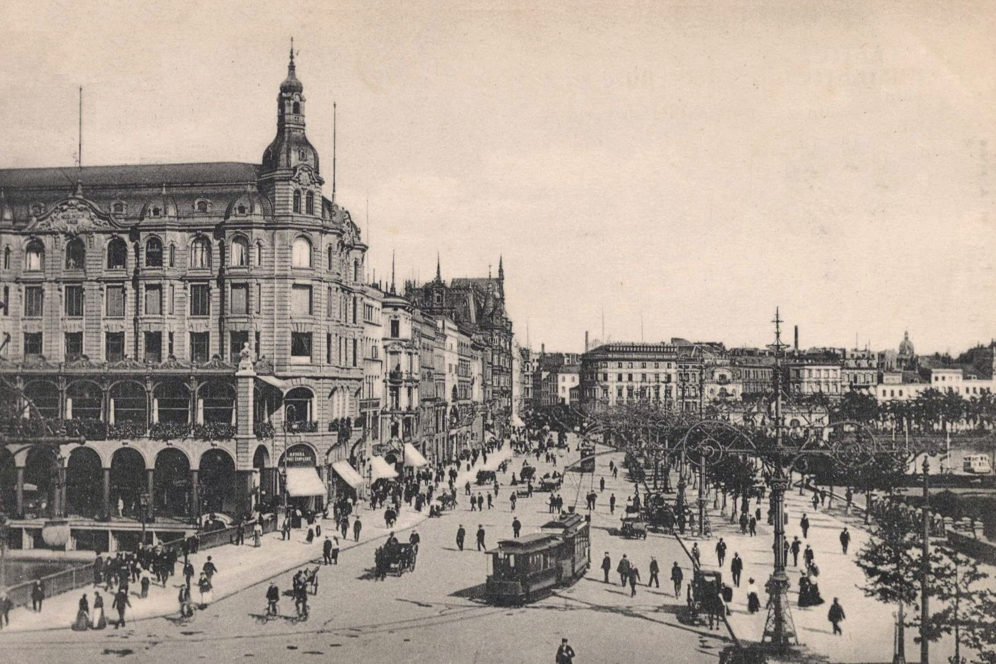 Hamburg, Hamburg: Jungfernstieg